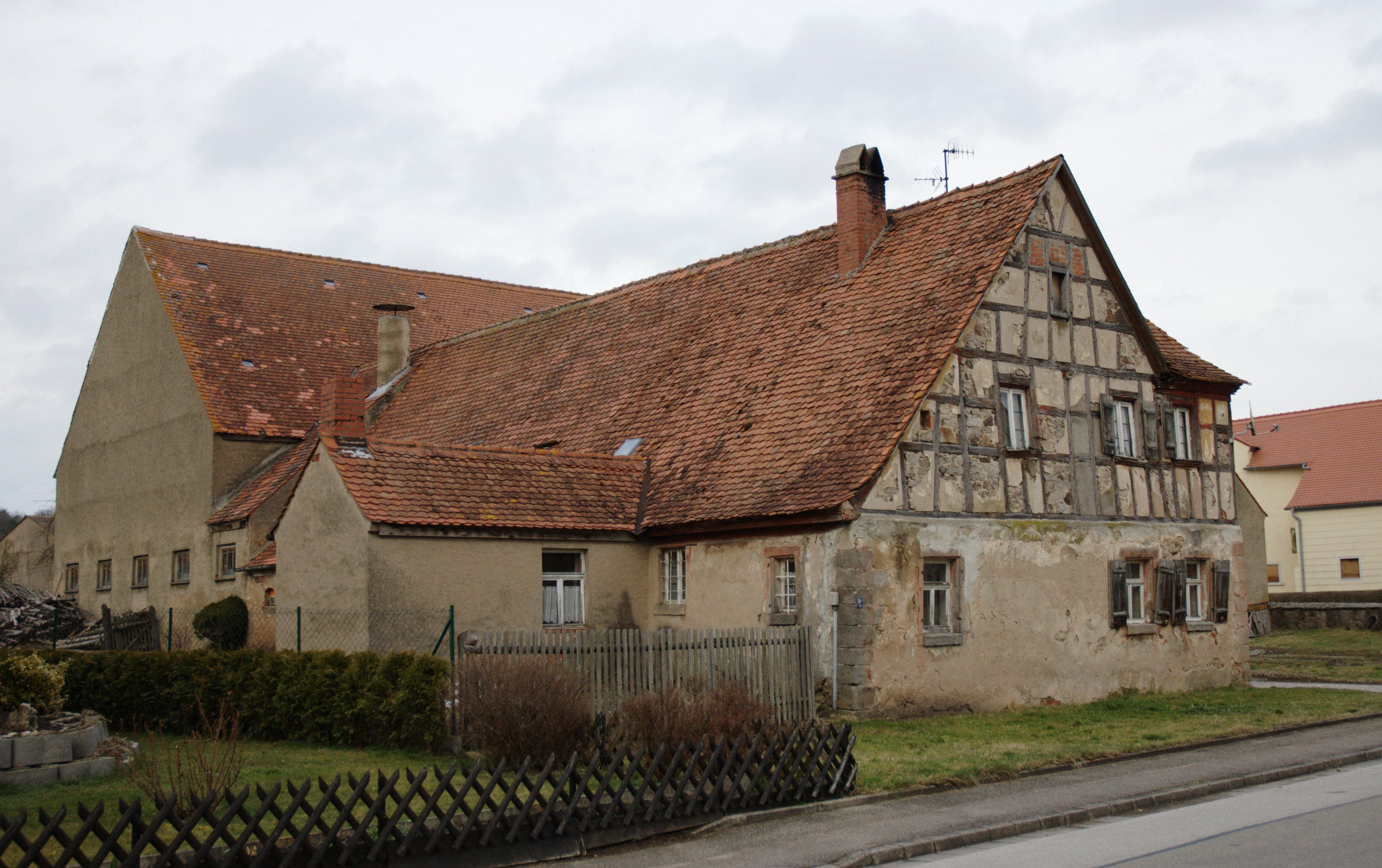 Zailach